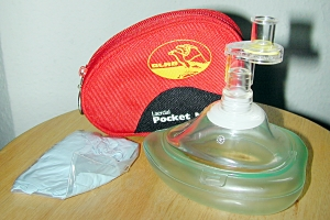 Set mit Taschenmaske als Beatmungshilfe und Einmal-Schutzhandschuhen